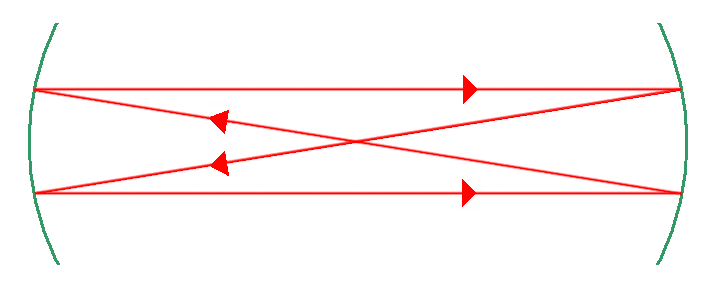 Strahlengang im Resonator